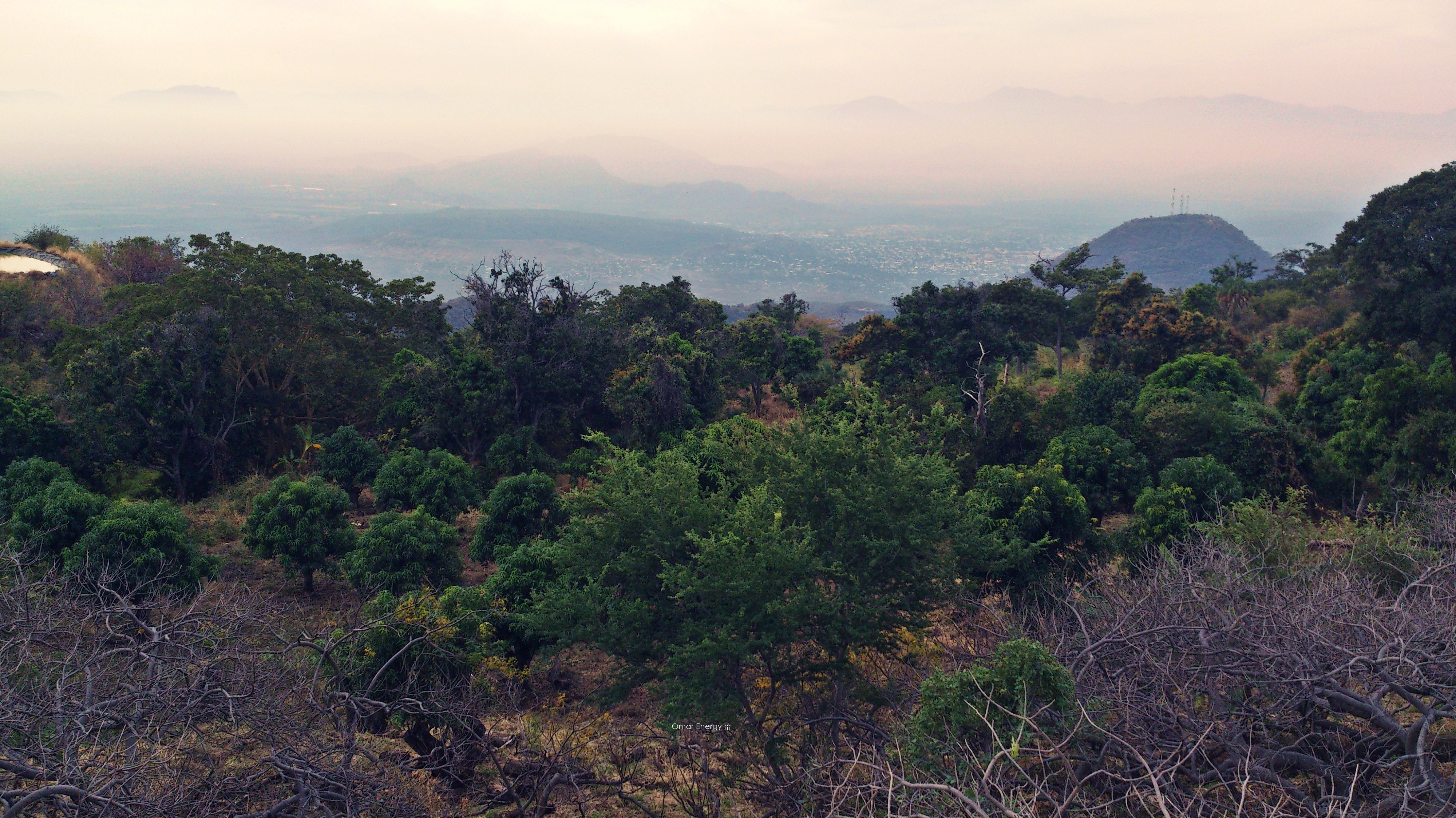 Vista de la Tierra Caliente desde el Mirador de Acahuato. Búscame en Facebook y en Youtube como; Omar Energy ¡¡¡ .